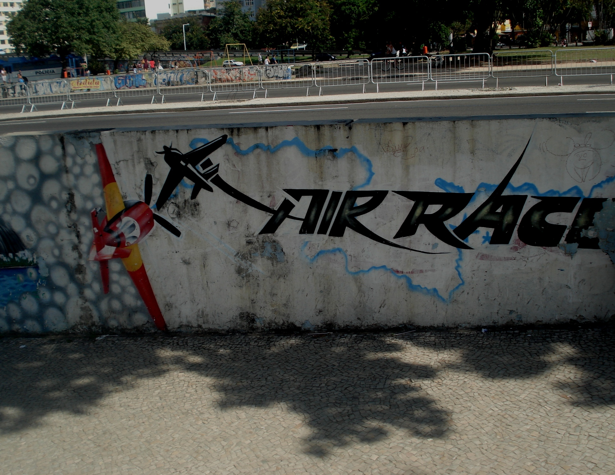 Grafite da Air Race no Rio de Janeiro, perto de onde se realiza a prova.